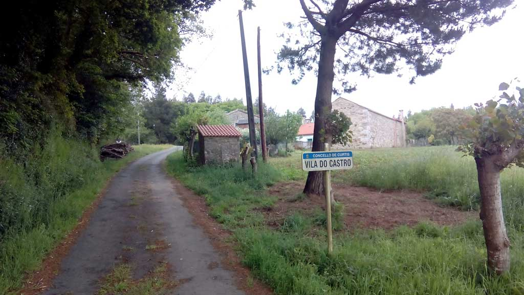 A Vila do Castro, Foxado.